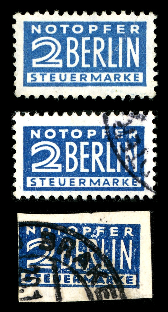 Deutsche Briefmarke - Berlin airlift notopfer stamp